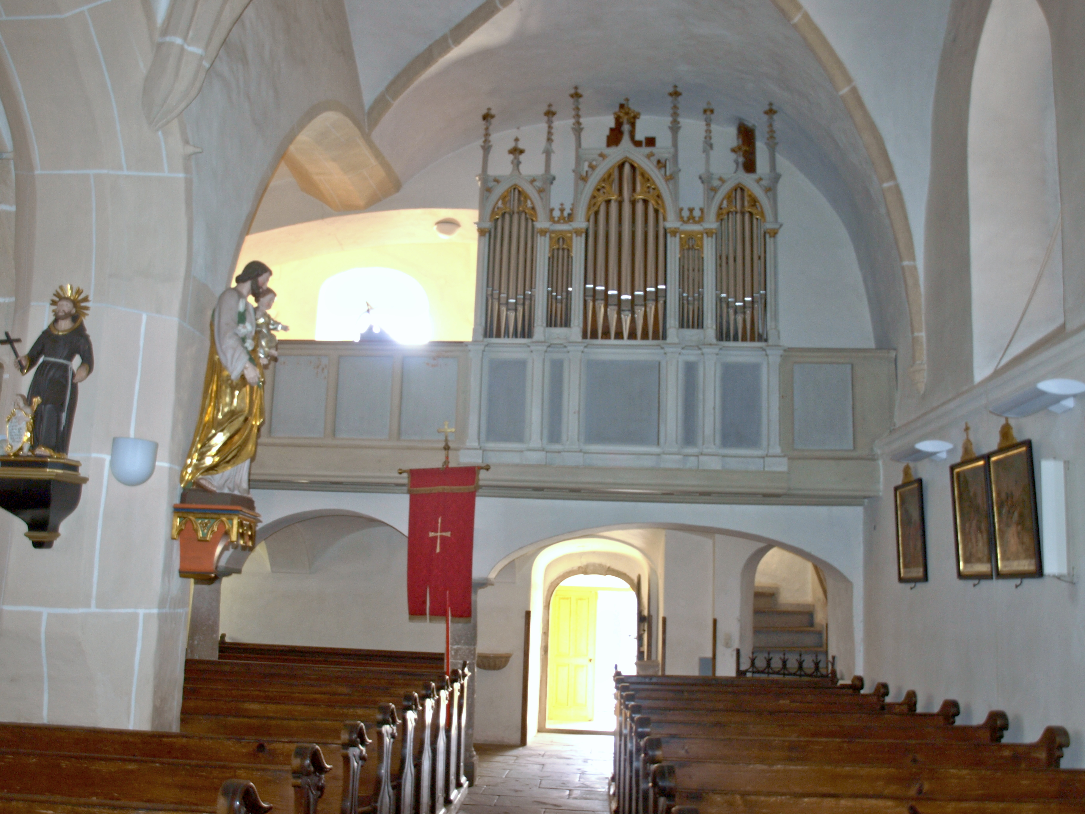 Kath. Pfarrkirche hl. Nikolaus